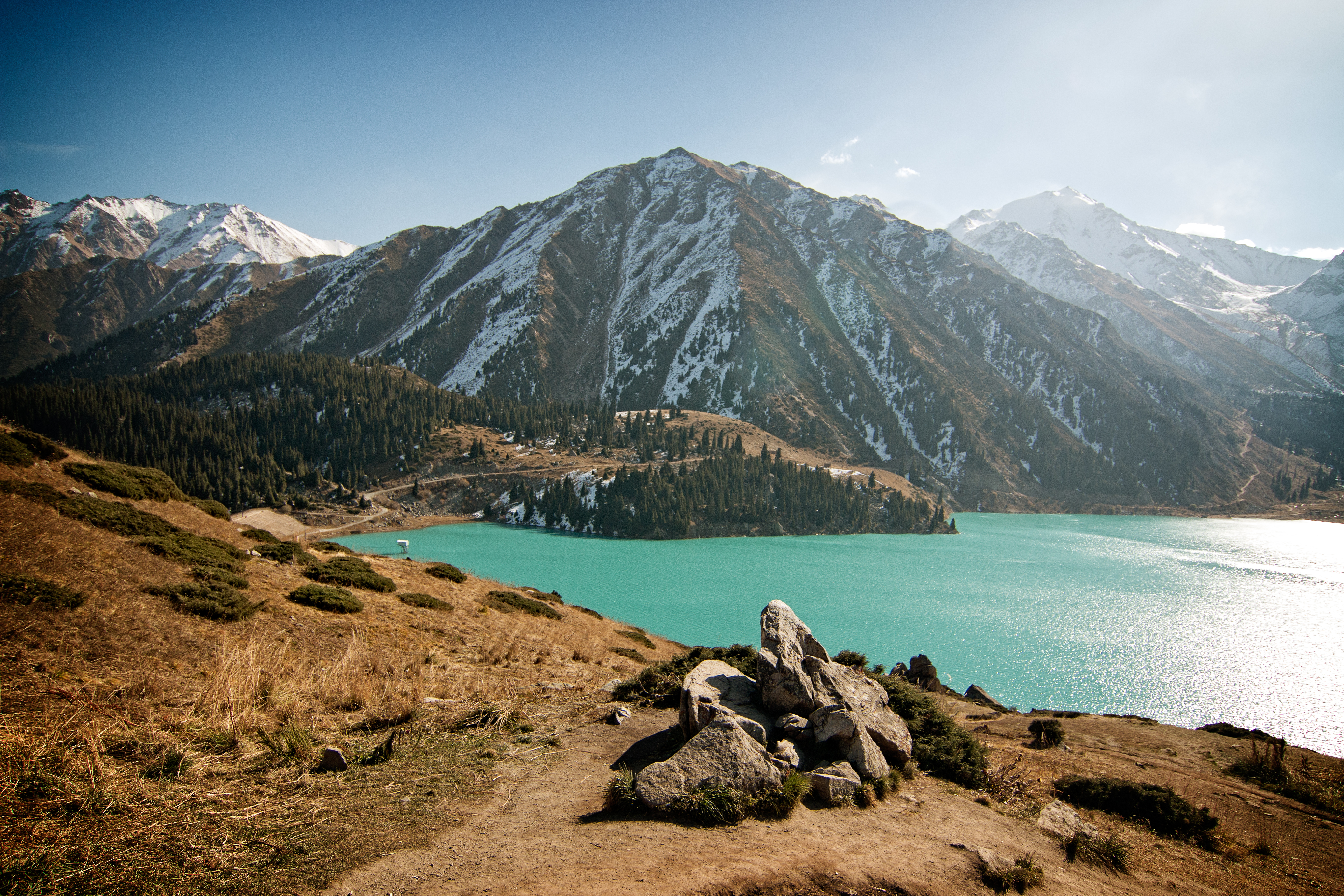 Big Almaty Lake, Trans-Ili Alatau, Kazakhstan